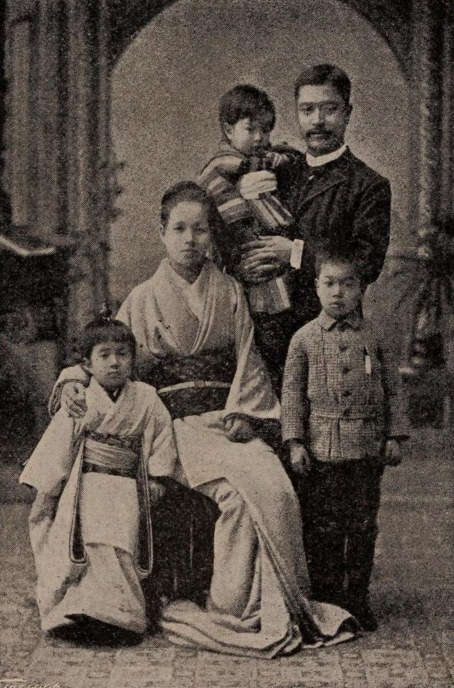 日本人のある家族 教授一家